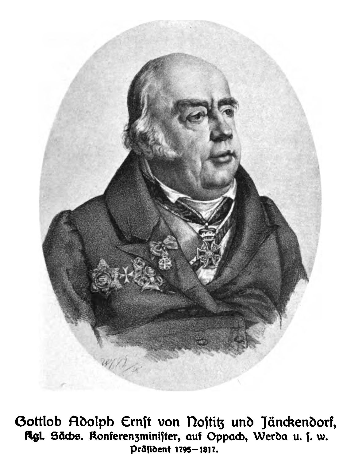 Gottlob Adolf Ernst von Nostitz und Jänkendorf (1765-1836), in: Neues lausitzisches Magazin, Band 80.